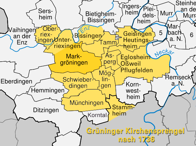 Bezirk der Gröninger Diözese nach 1736